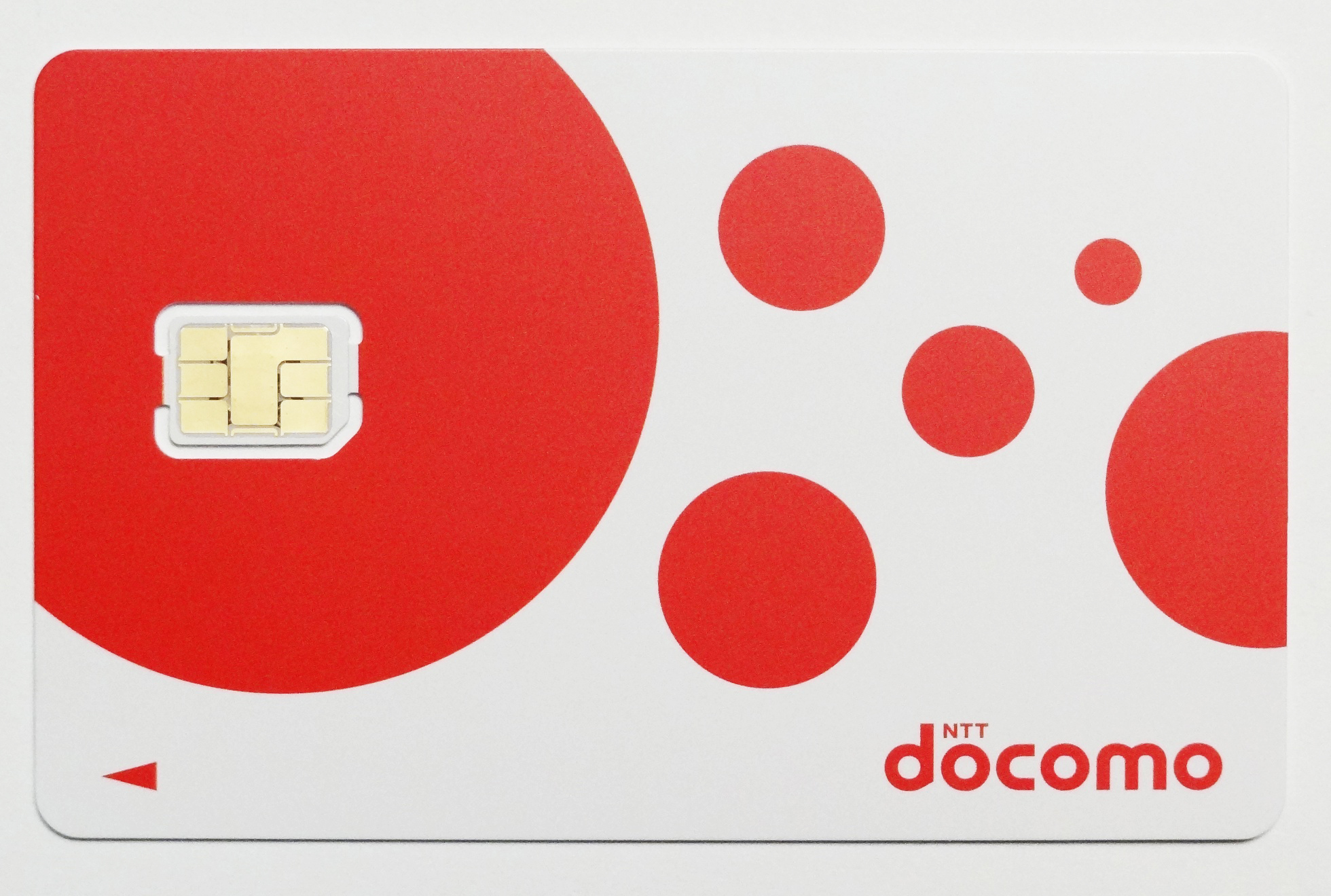 NTT docomoが提供する第3世代移動通信システム(FOMA)、および第3.9世代移動通信システム(Xi)に対応したnanoUIMカード、「GD04n」を台紙から切り離す前の写真です。平成24(2012)年11月7日撮影。